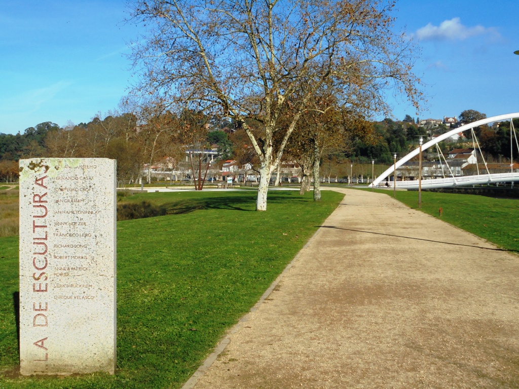 Parque de la Isla de las Esculturas Pontevedra capital